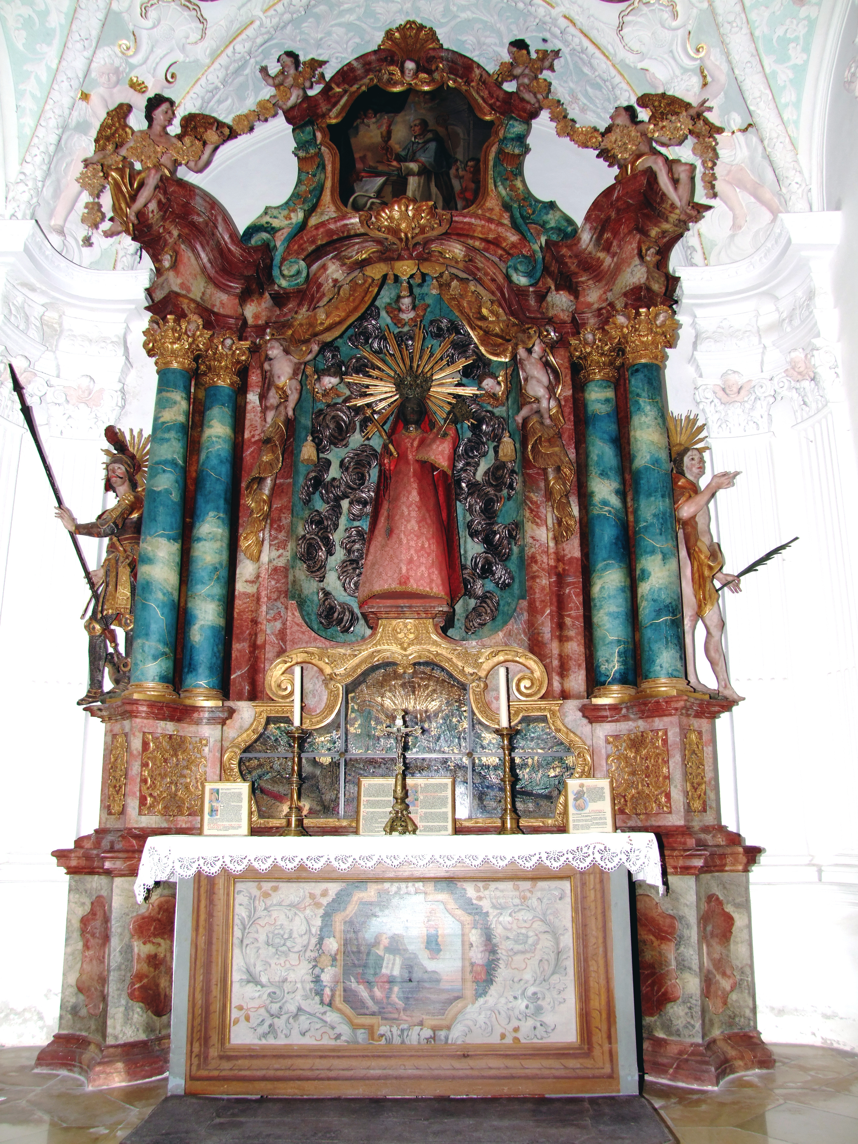 Marienkapelle in der ehemaligen Klosterkirche der Kartause in Buxheim bei Memmingen - OpenStreetMap(Info)